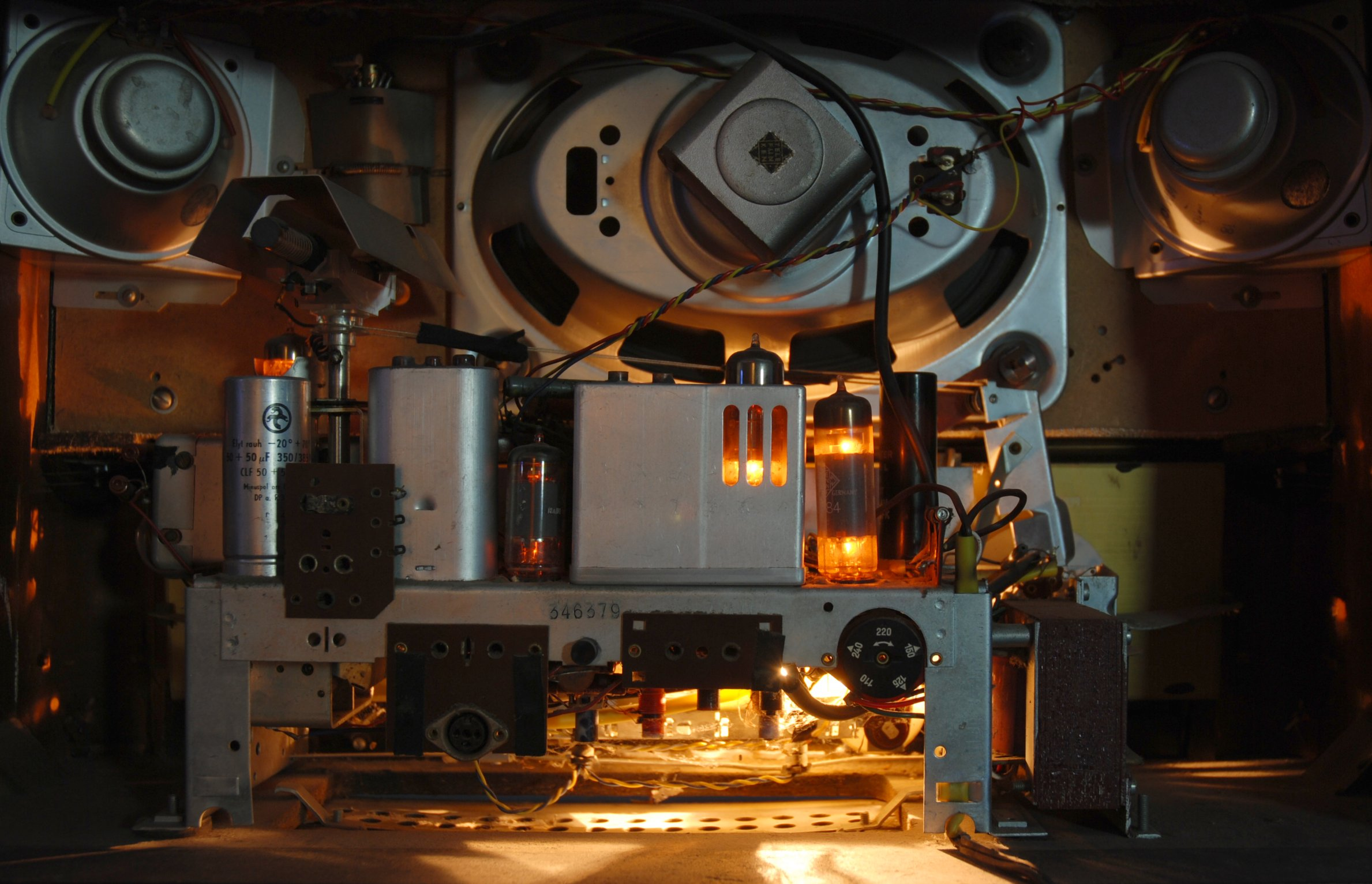 Innenleben eines "Telefunken Operette"-Röhrenradios